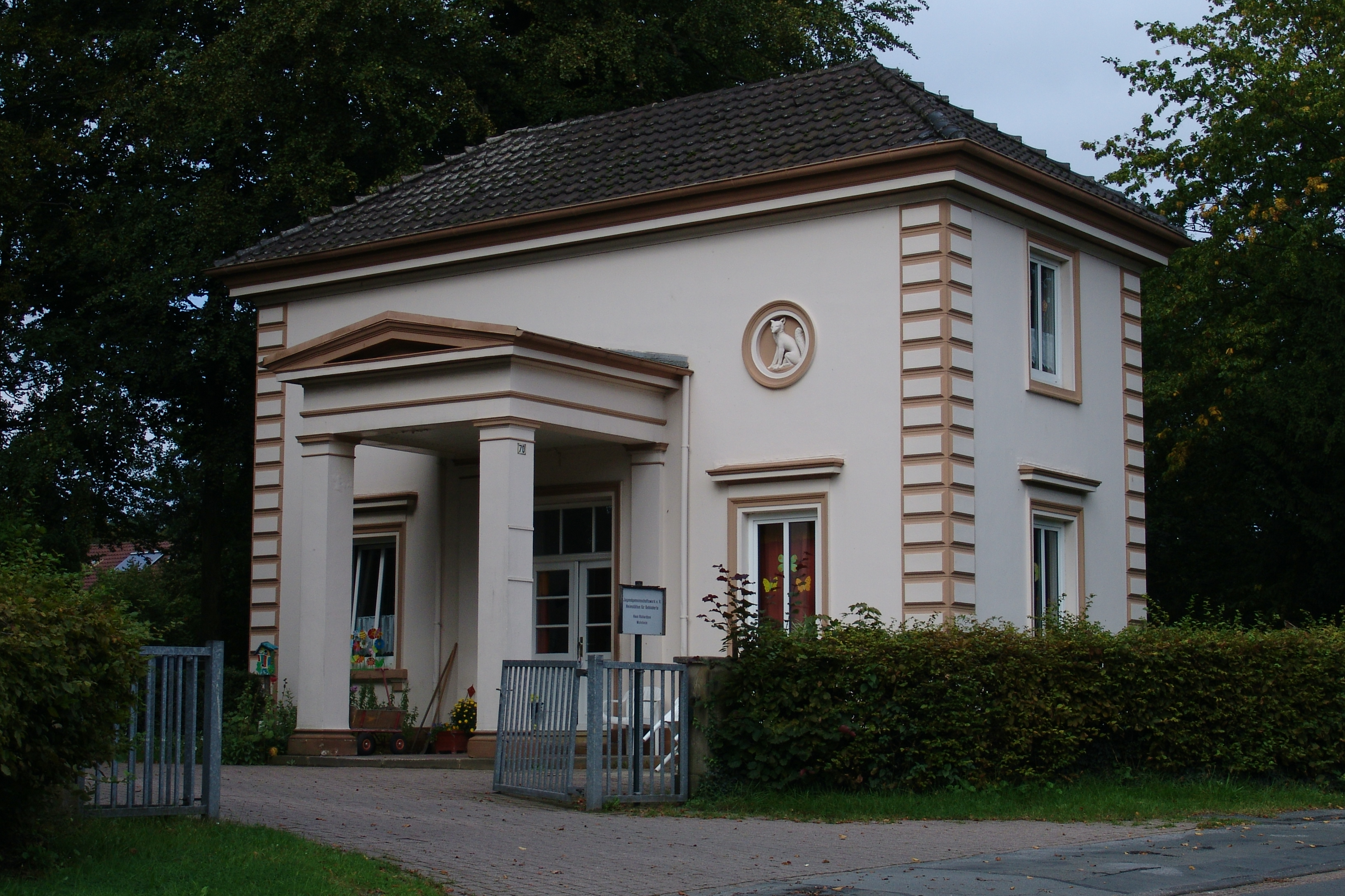 Rauchs Landgut, Gärtnerhaus in Bremen, Richthofenstraße 70.Das abgebildete Objekt ist ein geschütztes Kulturdenkmal in der Freien Hansestadt Bremen, mit der Nr. 1511 beim Landesamt für Denkmalpflege registriert.